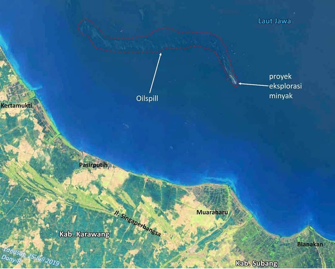 Citra Satelit tgl 25 Juli dari tumpahan minyak yg terjadi dari sumur YYA-1 milik Pertamina Hulu Energi ONWJ